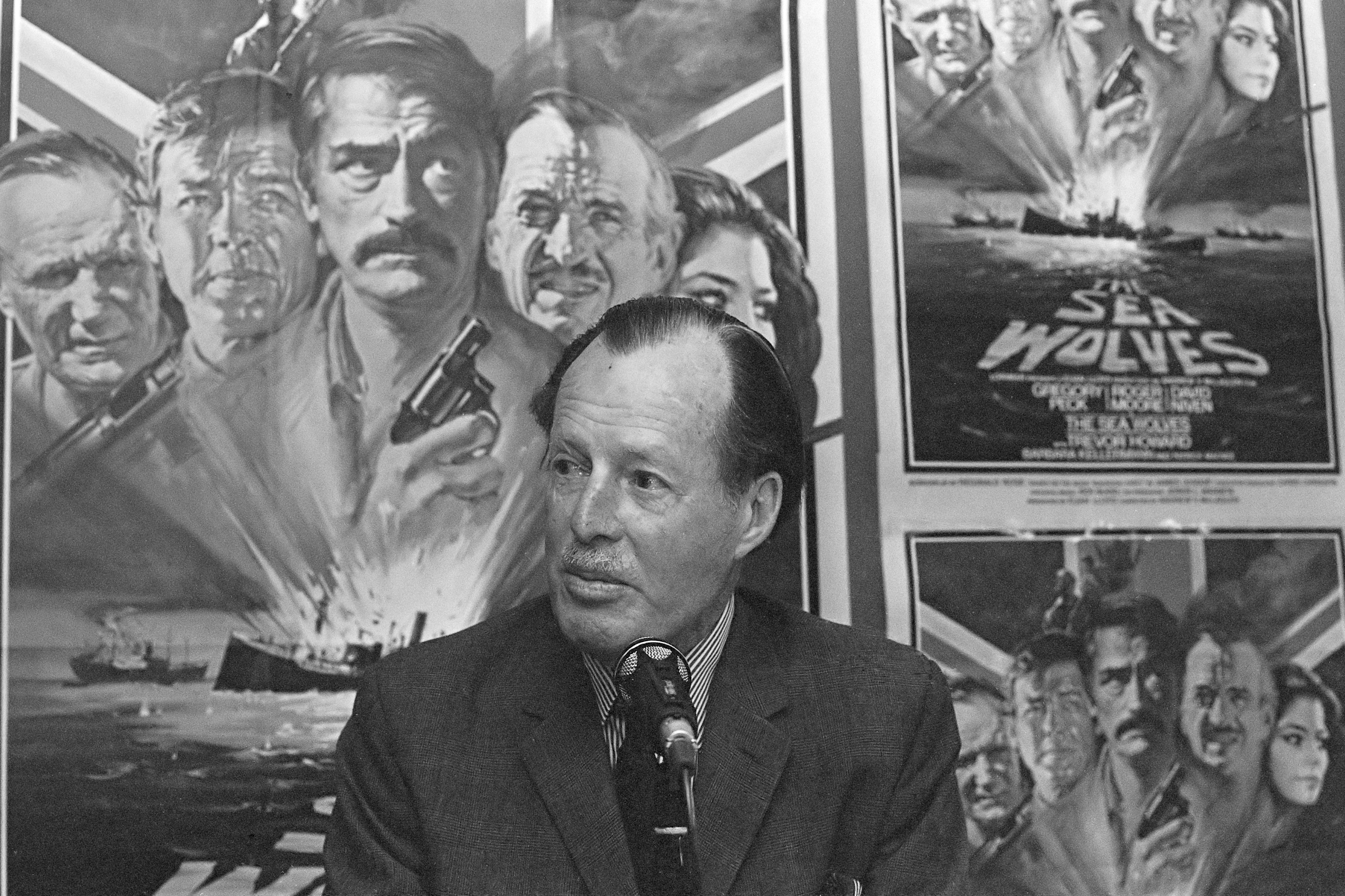 Voorvertoning van de film The Sea Wolves die op 16 oktober 1980 in première gaat. Generaal Pugh, destijds Special Operations Executive, tijdens persconferentie. Op de achtergrond posters met Gregory Peck, die Pugh speelde (Lewis Henry Owain Pugh (1907-1981), zie 24 september 1980